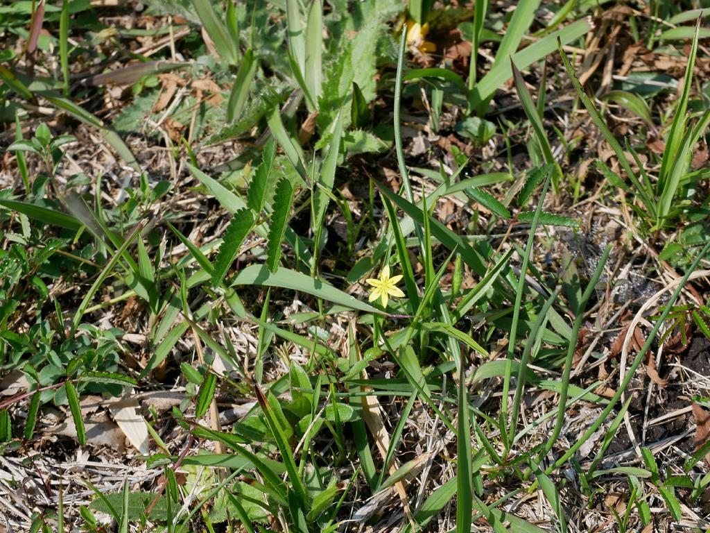 2019/04/22 宮崎県川南湿原：Kawaminami, Miyazaki Pref. Japan